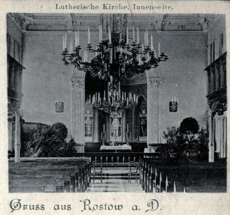 Интерьер Лютеранской церкви Святых Петра и Павла в Ростове-на-Дону